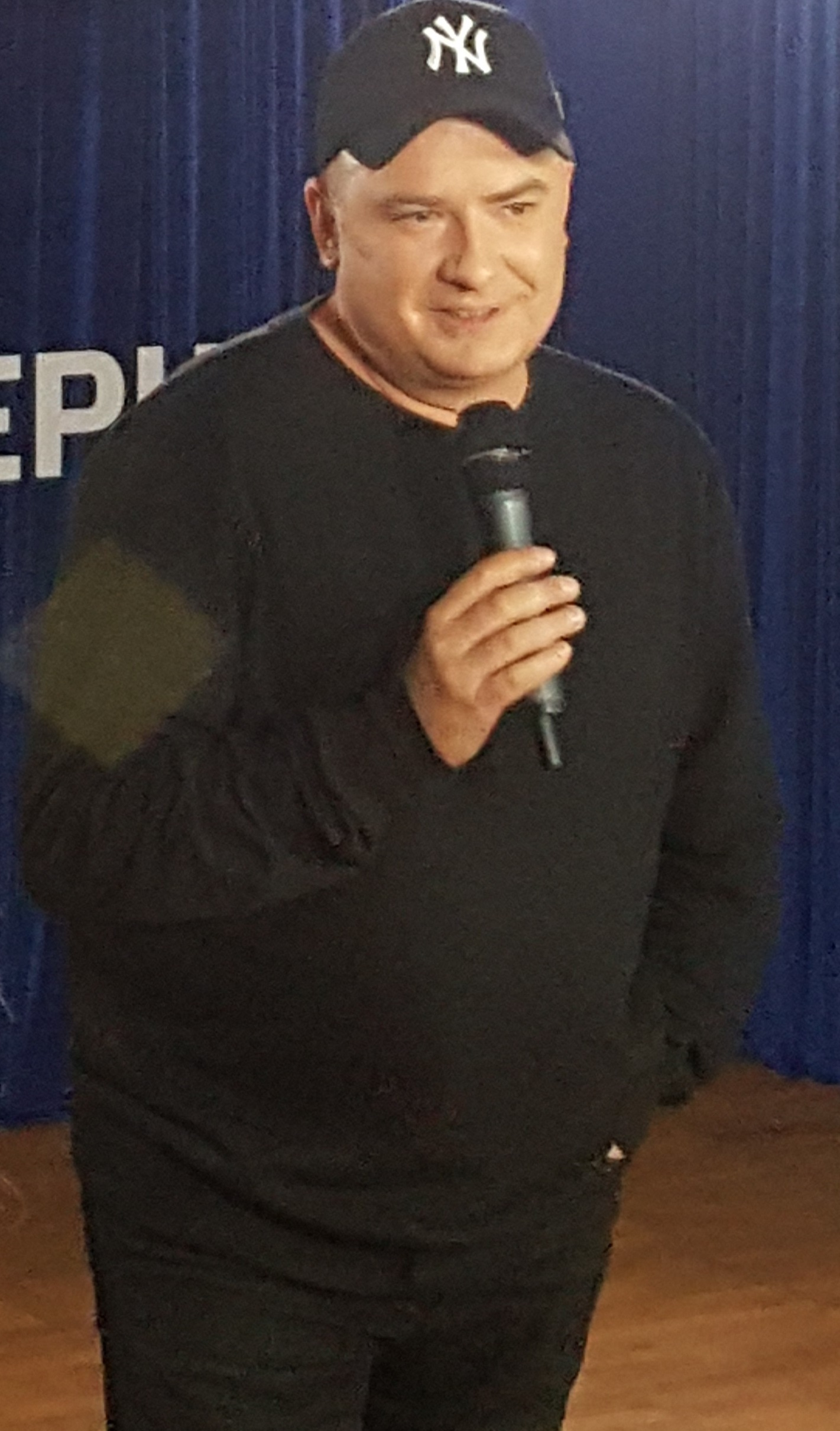 Ukraiński performer Andrij Danyłko w lutym 2018 roku.